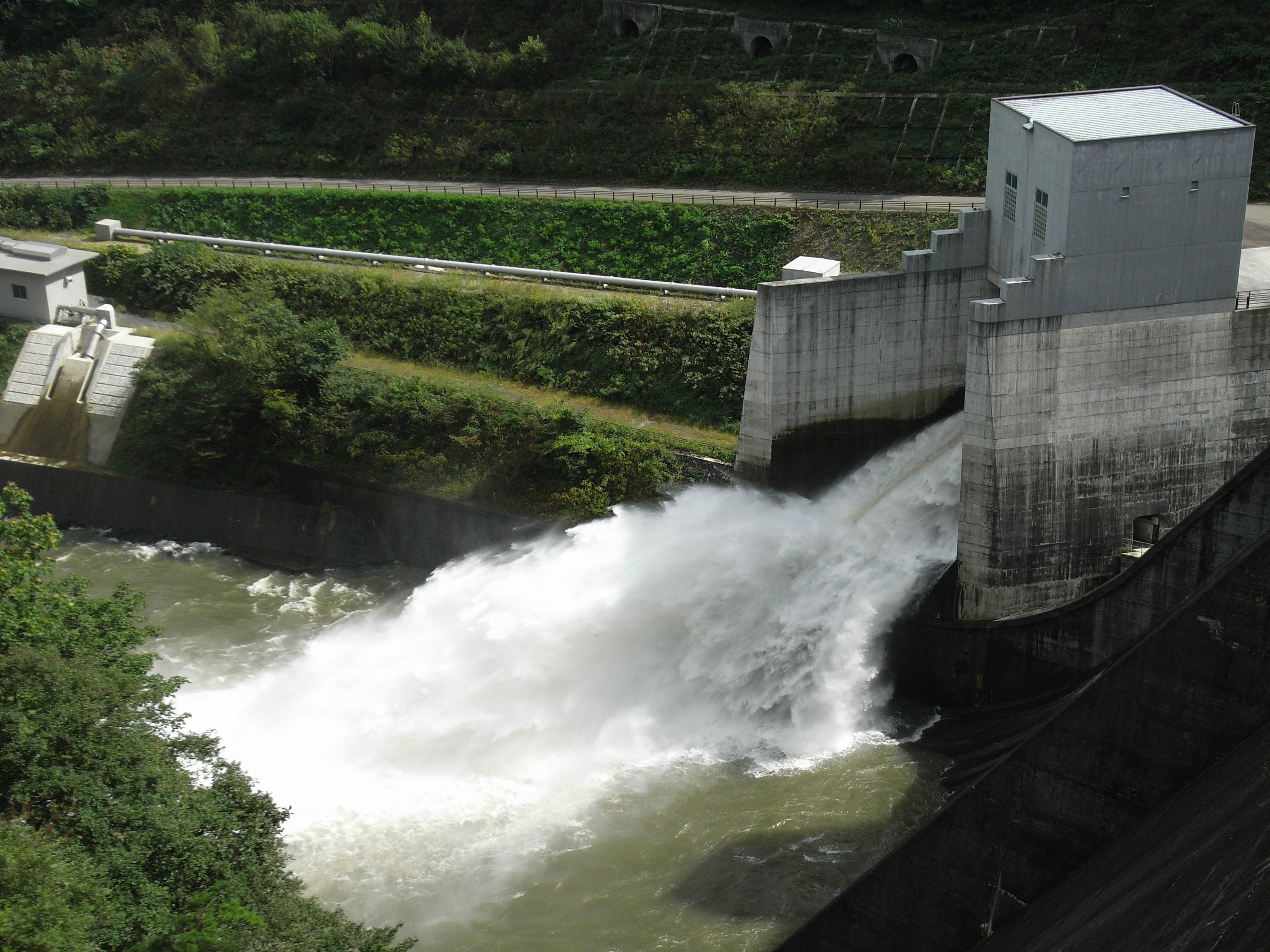 Dam